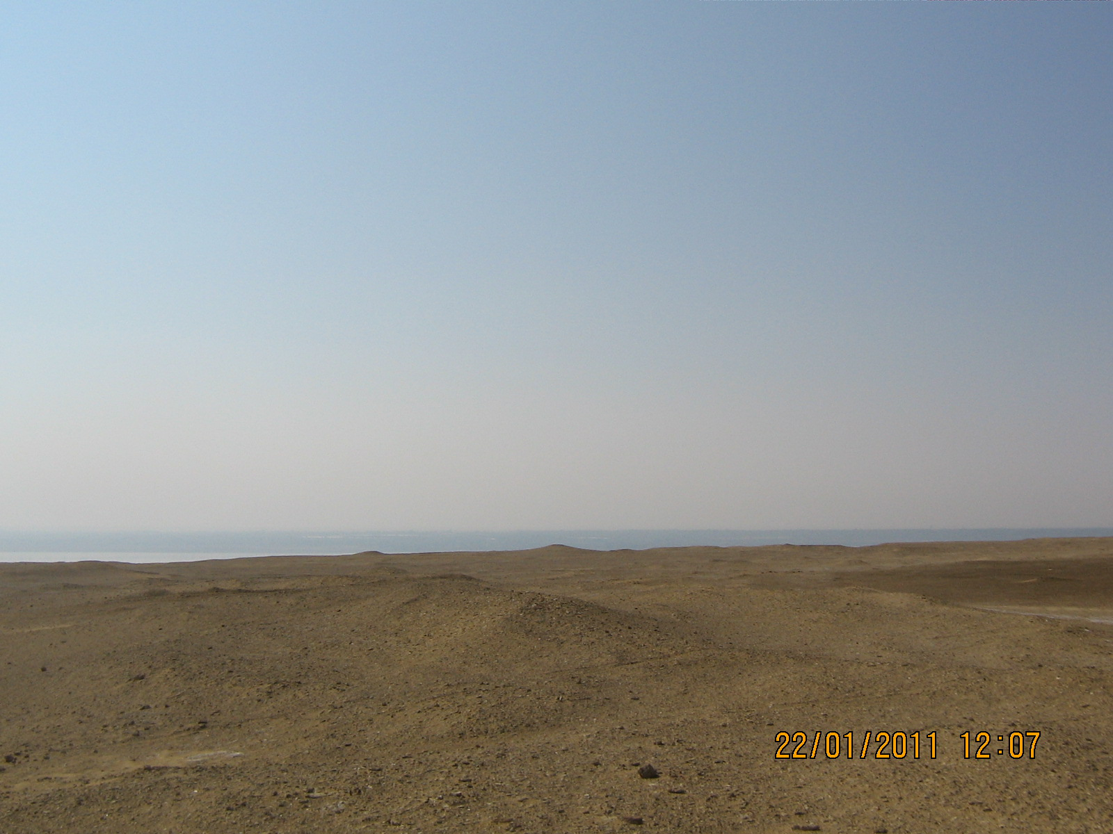 مصرى: مجموعه من الأصدقاء تقوم برحله الى محمية قارون بمحافظة الفيوم وهى مكان جيولوجى قديم جدا يعود الى عصور جيولوجيه من ملايين السنين , المكان به تكوينات ذات أشكال غريبه من نحت الطبيعه , كما يوجد به بحيرة قارون وهى من أقدم البحيرات الطبيعيه فى العالم , مع ممارسة رياضة التسلق This is an image with the theme "Play" from: Egypt